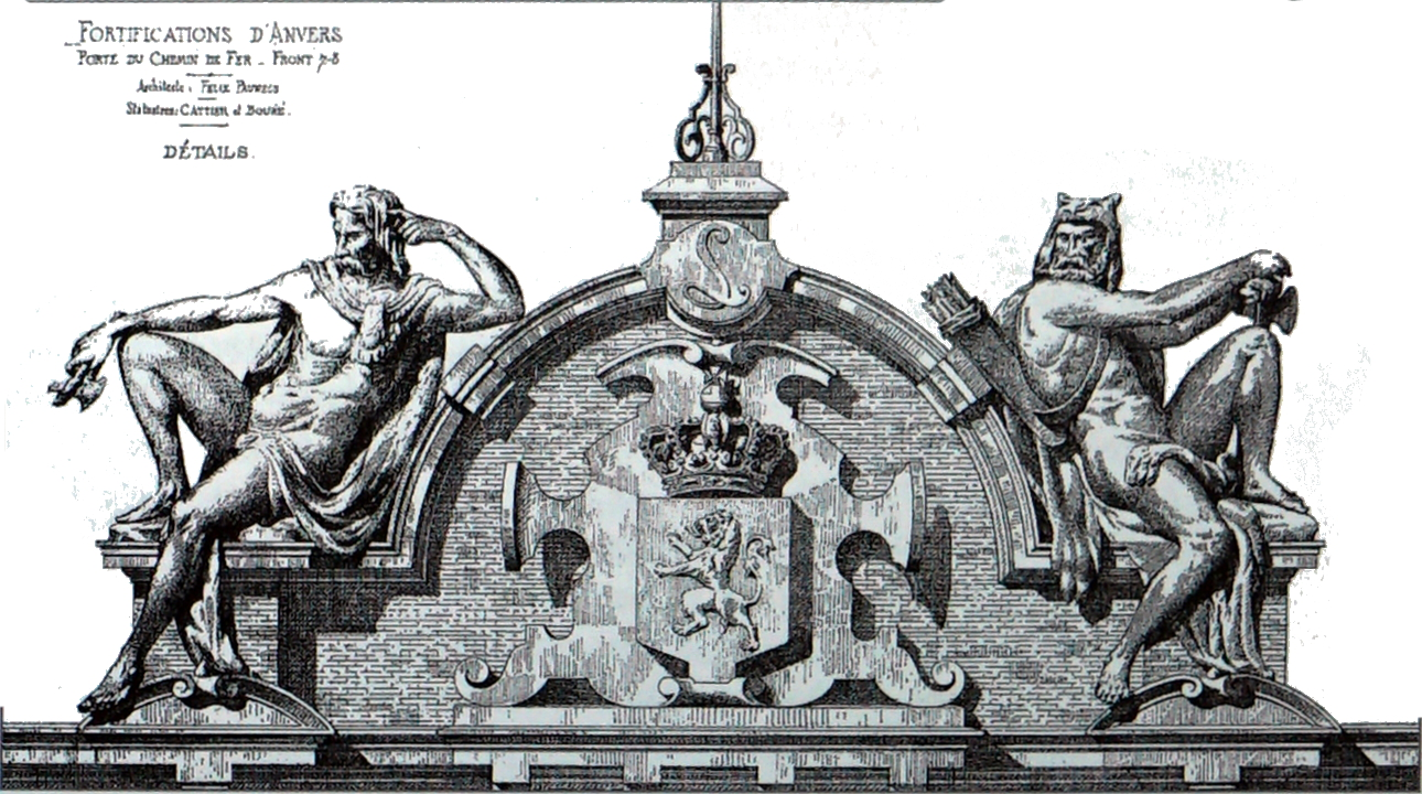 ancienne enceinte fortifiée d'Anvers.